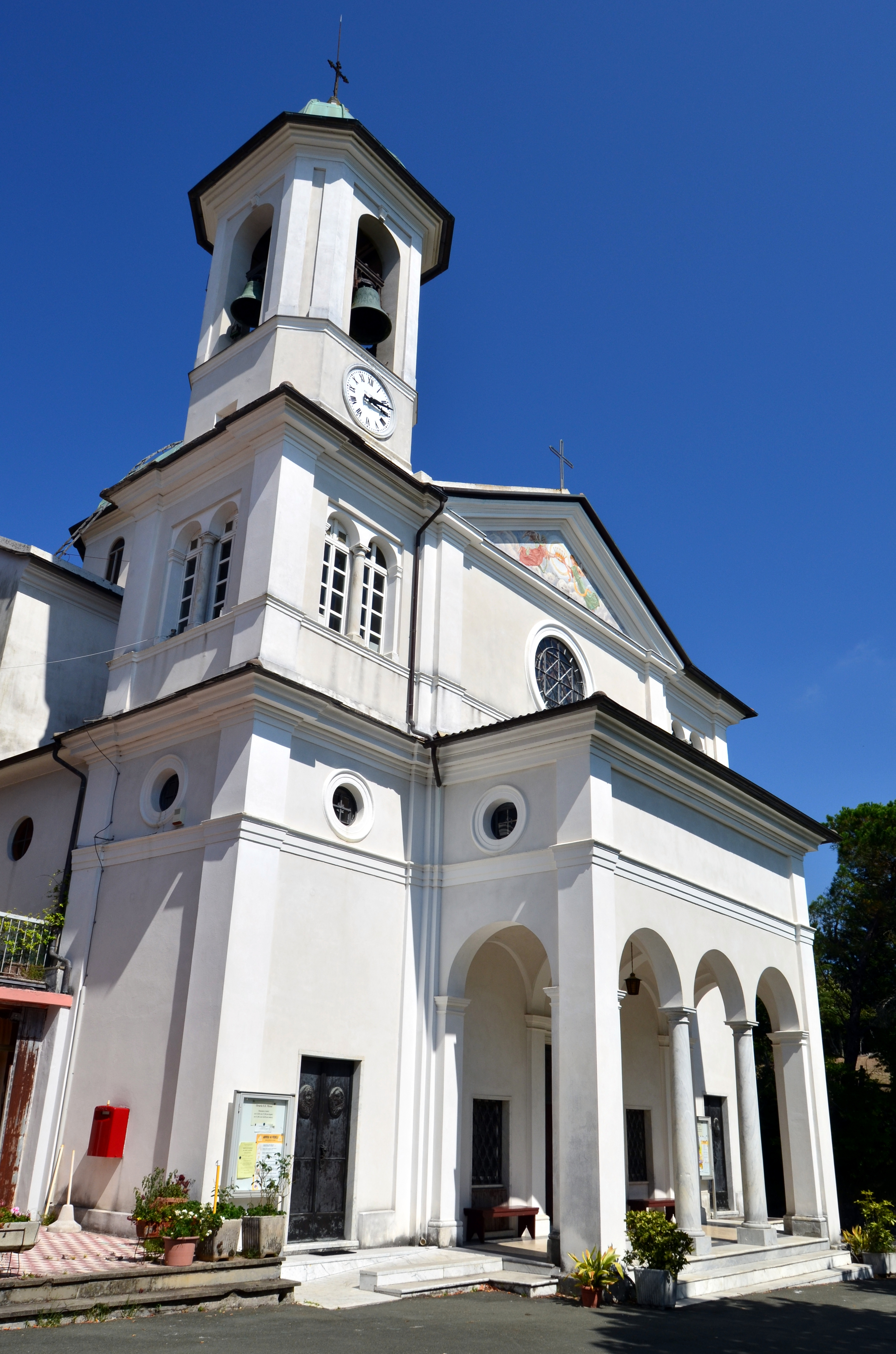 Santuario di Nostra Signora della Guardia, Velva, Castiglione Chiavarese, Liguria, Italia